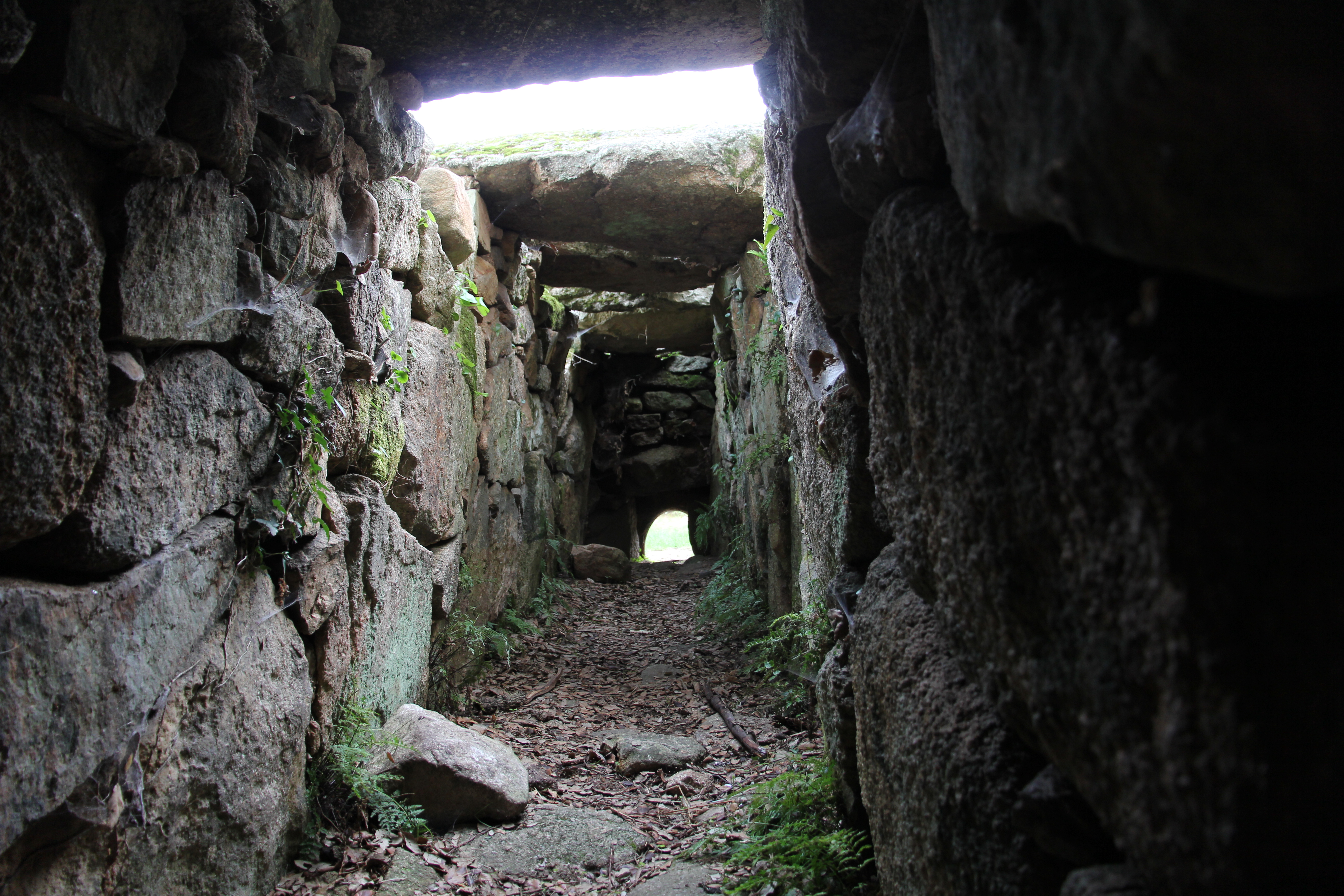 Tomba dei giganti di Pascaredda - m 442 s.l.m.